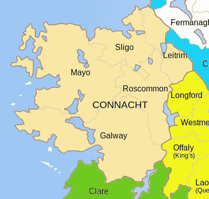 Connacht map